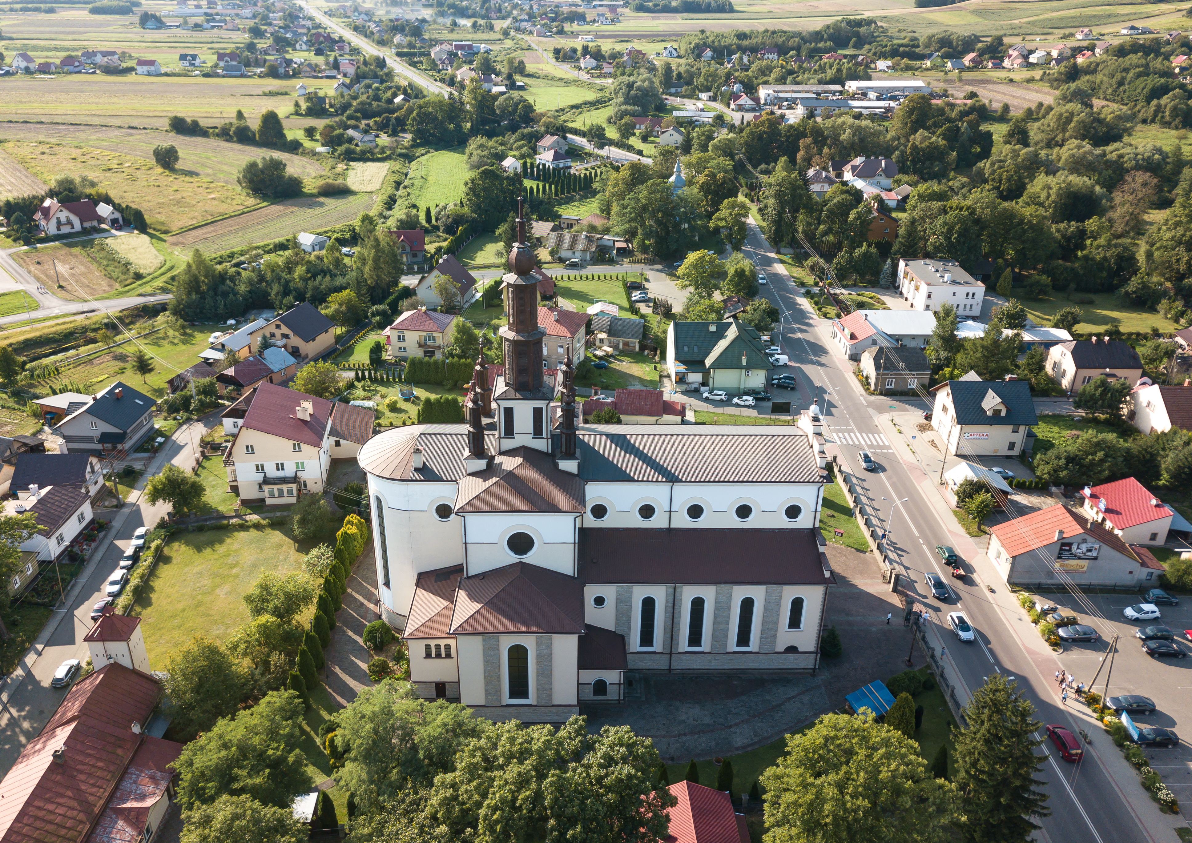 kościół Niepokalanego Serca Najświętszej Maryi Panny w Dubiecku, widok z lotu ptaka (z drona)